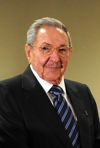 Raúl Castro durante un encuentro en septiembre de 2015 con el presidente ruso Valdimir Putin